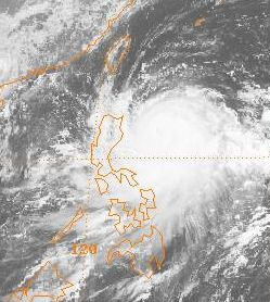 National Climatic Data Center's GIBBS satellite archive ftp://eclipse.ncdc.noaa.gov/pub/isccp/b1/.D2790P/images/1986/189/Img-1986-07-08-00-GMS-3-VS.jpg